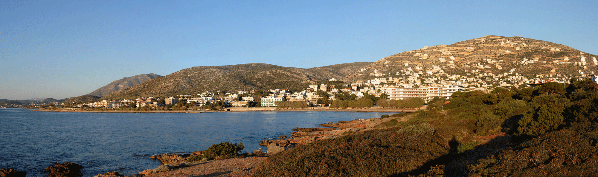 SARONIDA, SARONIS, ΣΑΡΩΝΙΔΑ